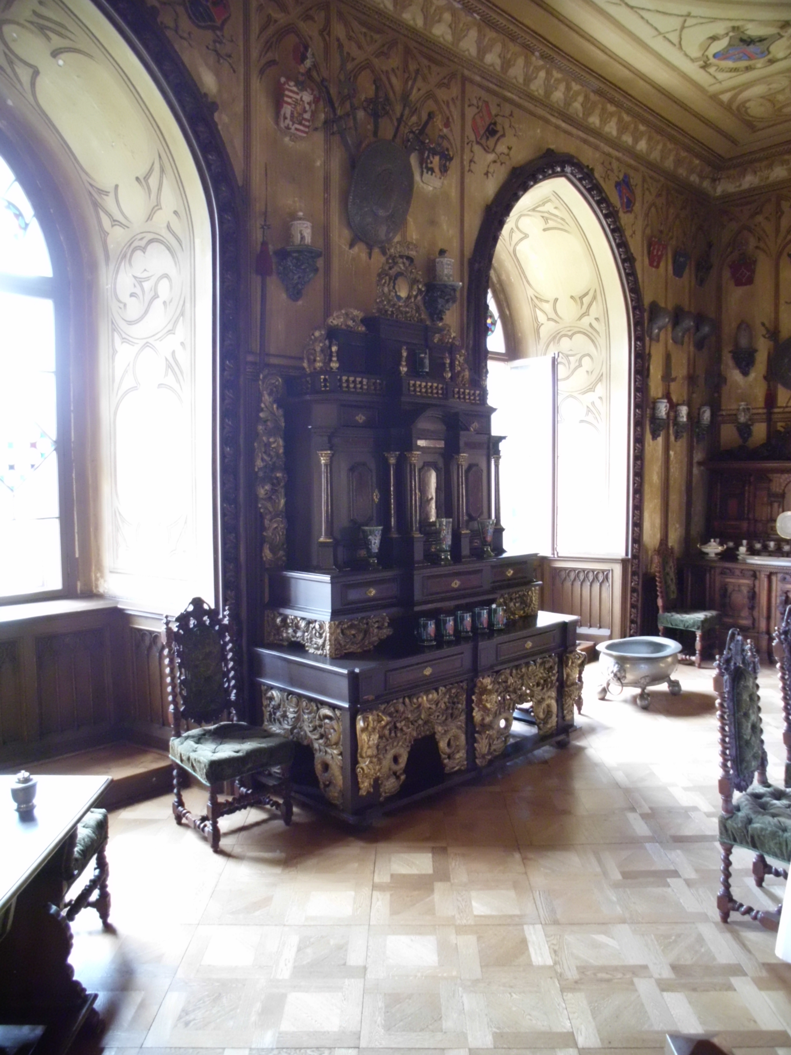 Zámek Hrubý Rohozec Turnov, Turnov 1